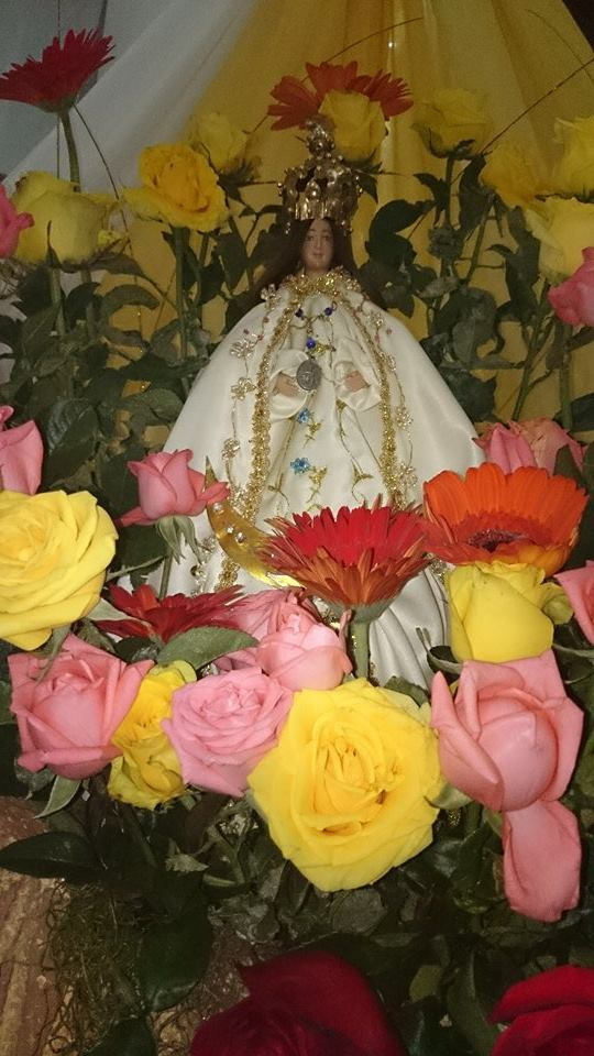 Santa Maria del Socorro de Barcelona, Anzoategui, Venezuela, "La Virgen del Totumo" "¡Oh Virgen de Barcelona que desde tu antiguo templo, del Neverí tú presides las fiestas ha mucho tiempo! Préstale, santa Patrona, a mi humilde voz aliento, para que la fe pregone de ese tu querido pueblo". (Autor Barcelones Anónimo)